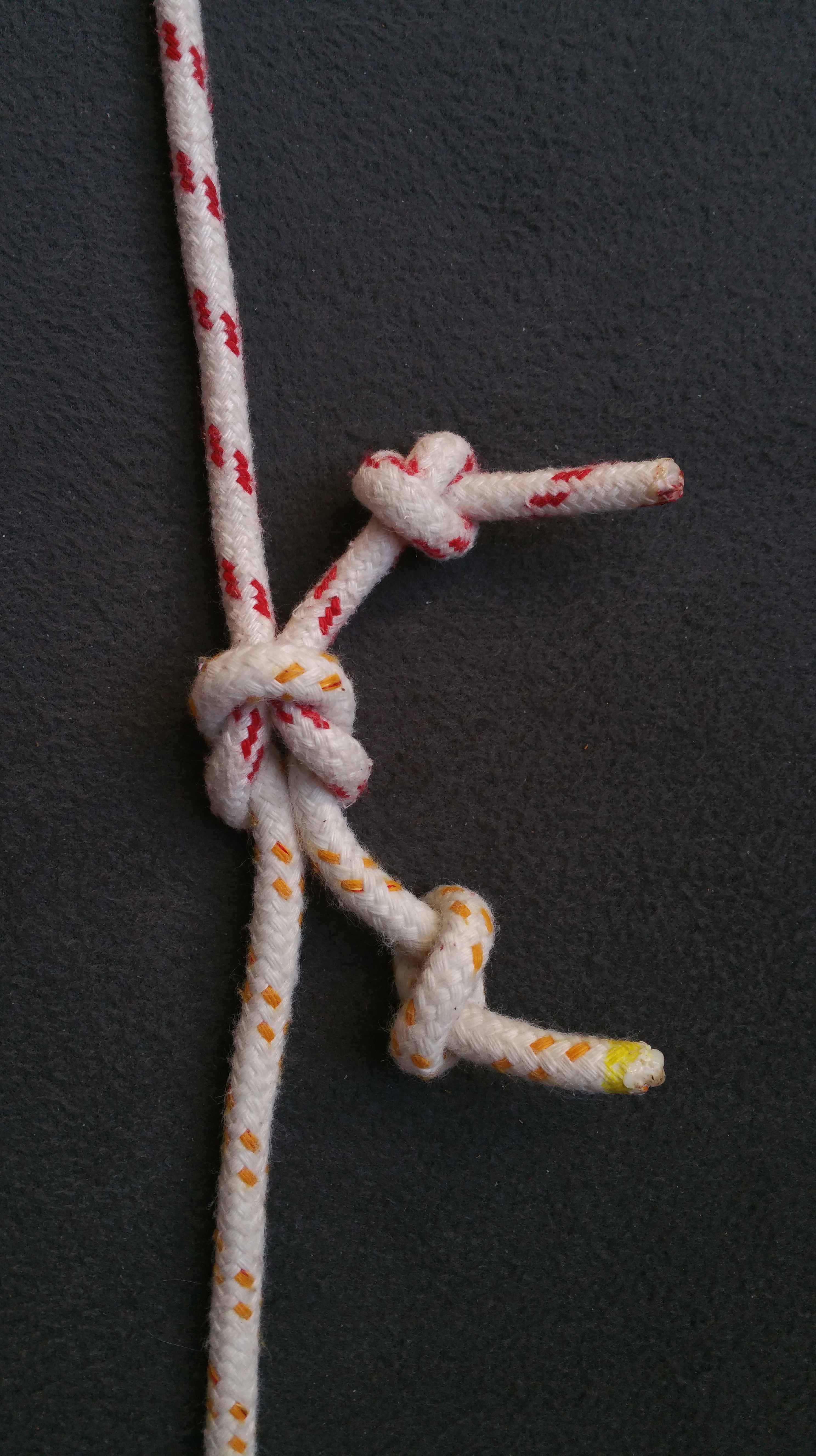 Kreuzknoten (zuerst links über rechts, dann rechts über links gelegt) mit zwei Überhandknoten. Wenn als Ansteckknoten (Verbindungsknoten) verwendet, verhindern die Überhandknoten das Ausrauschen